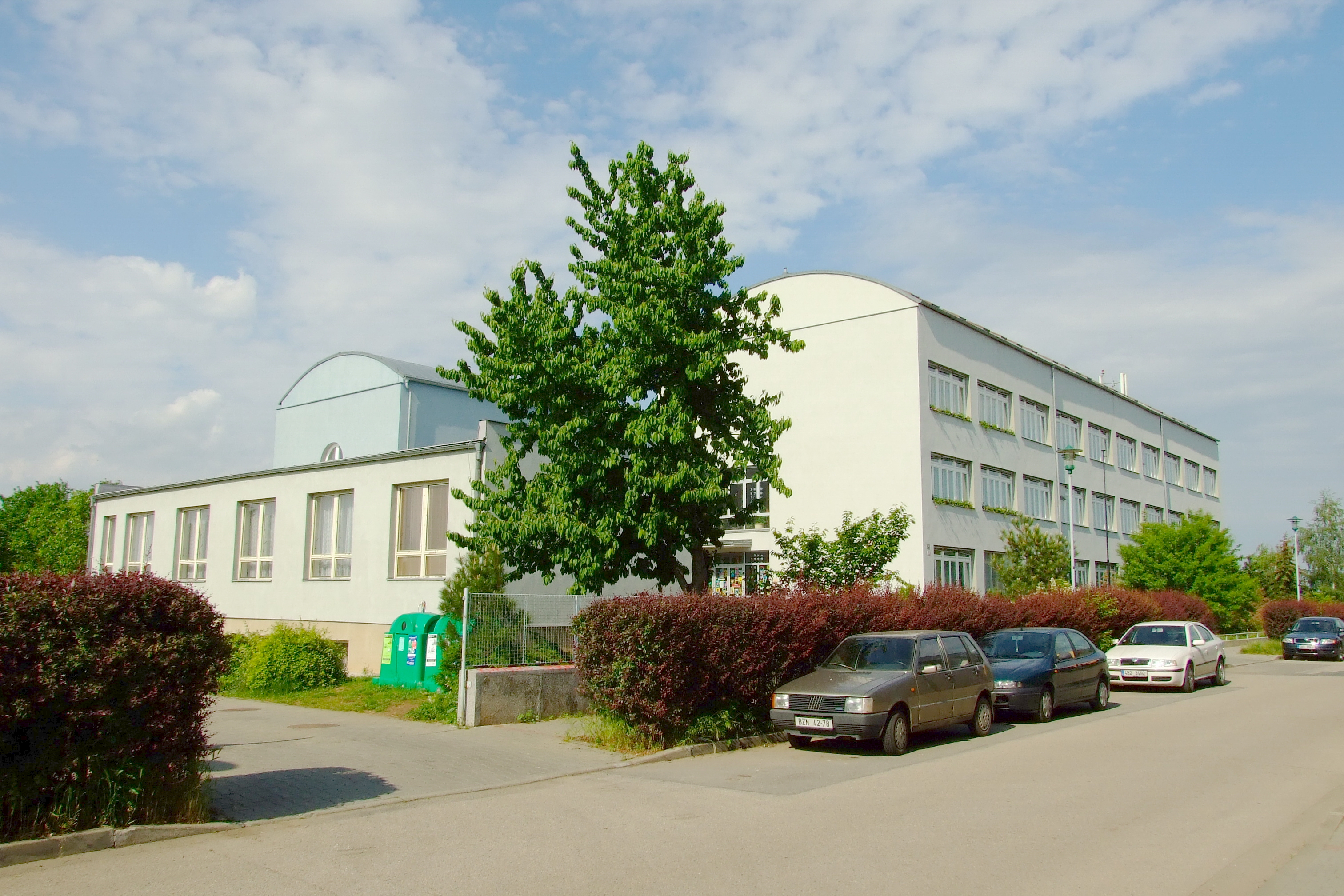 Brněnské Ivanovice - základní škola v Měšťanské ulici. Původně však vedla katastrální hranice západně od školy a ta tudíž náležela k Tuřanům.